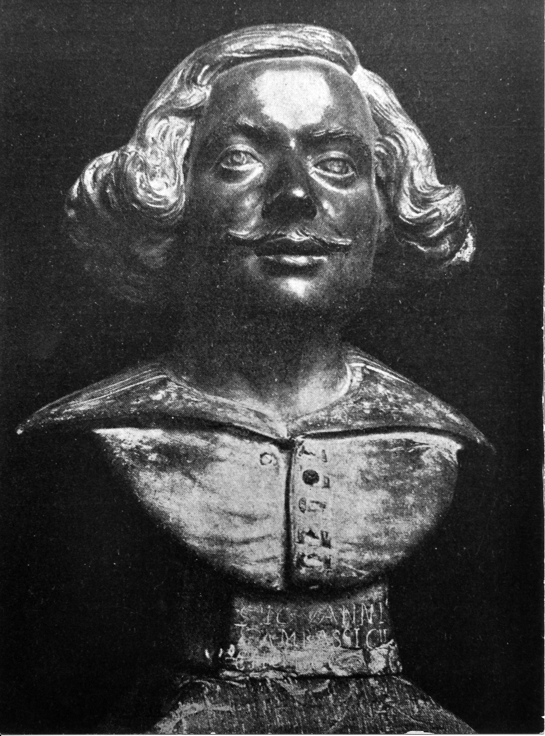 Giovanni Gonnelli, detto il "Cieco di Gambassi", Autoritratto, terracotta conservata fino al 1942 presso la famiglia Villoresi di Colonnata (Sesto Fiorentino), oggi dispersa. Sulla parte anteriore della base si legge: GIOVANNI GAMBASSI CIECHO FECE